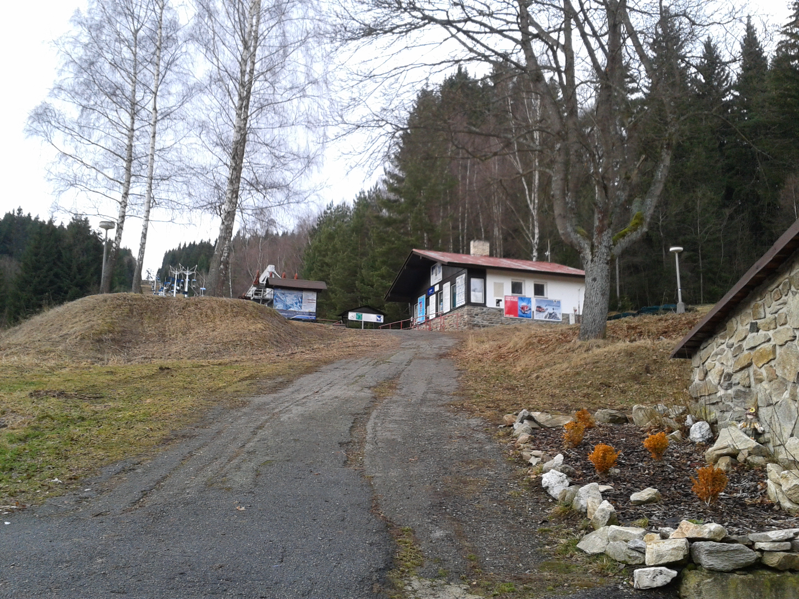 Lanová dráha Zadov-Churáňov